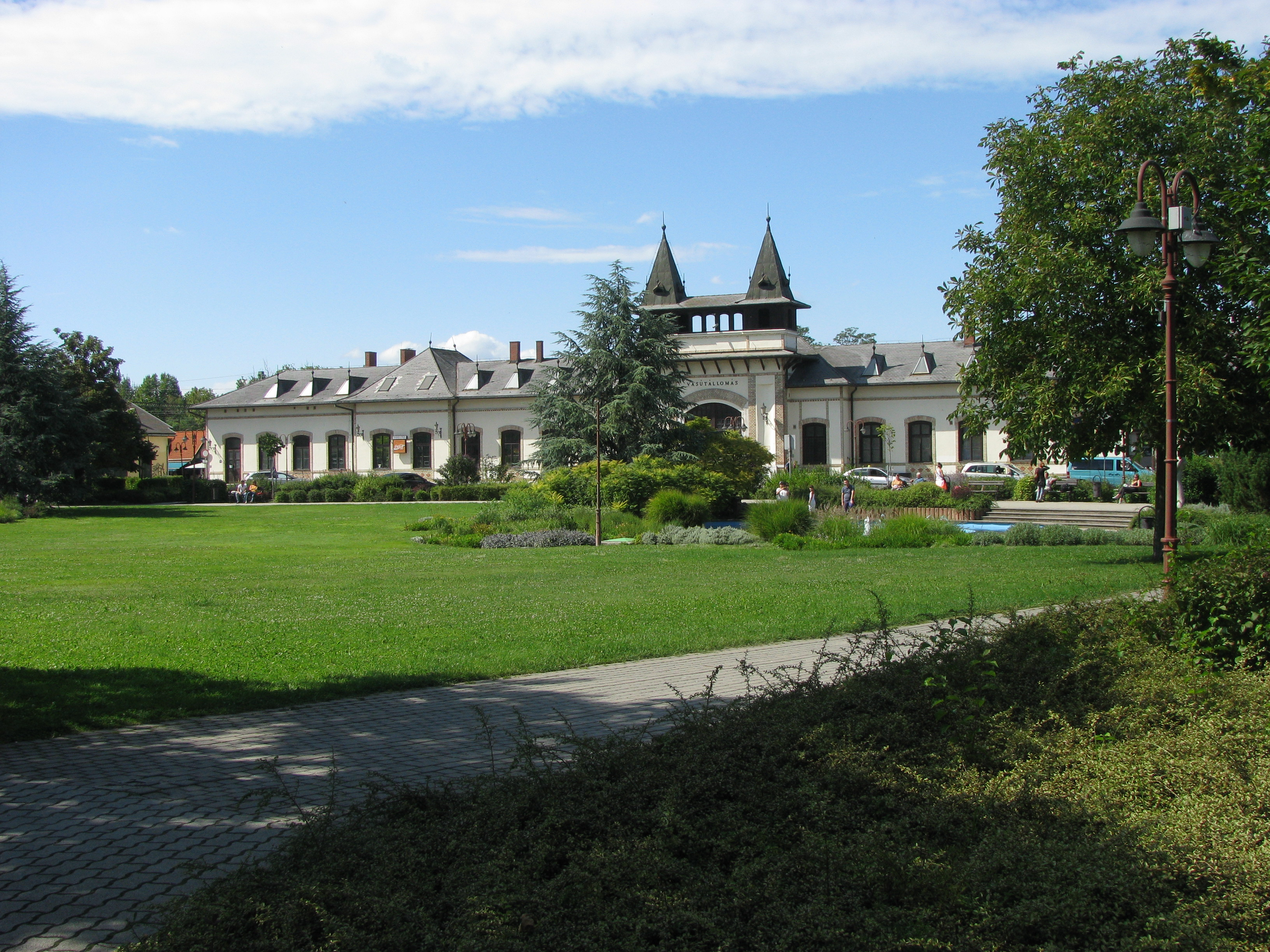 Siófok, Hungary